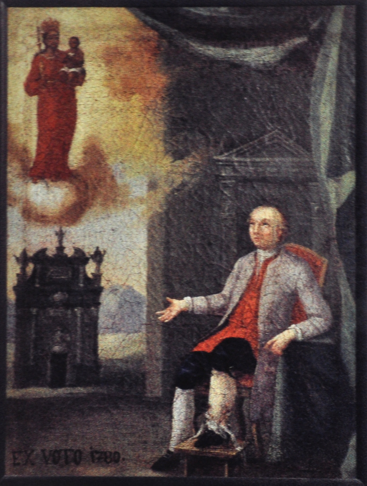 Votivbild als Dankgabe für die Genesung nach einem Knochenbruch, mit Porträt des Baumeisters Christian Großbayer (1718–1782)